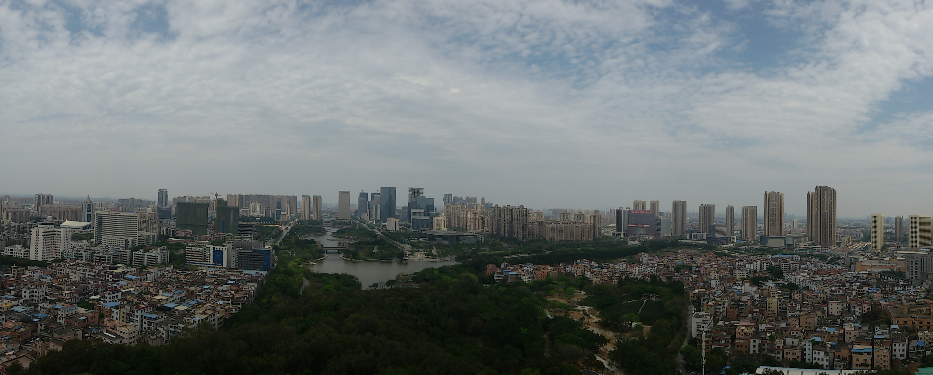 粵語: 佛山南邊嘅全景（喺千燈湖公園嘅魁星樓頂影）